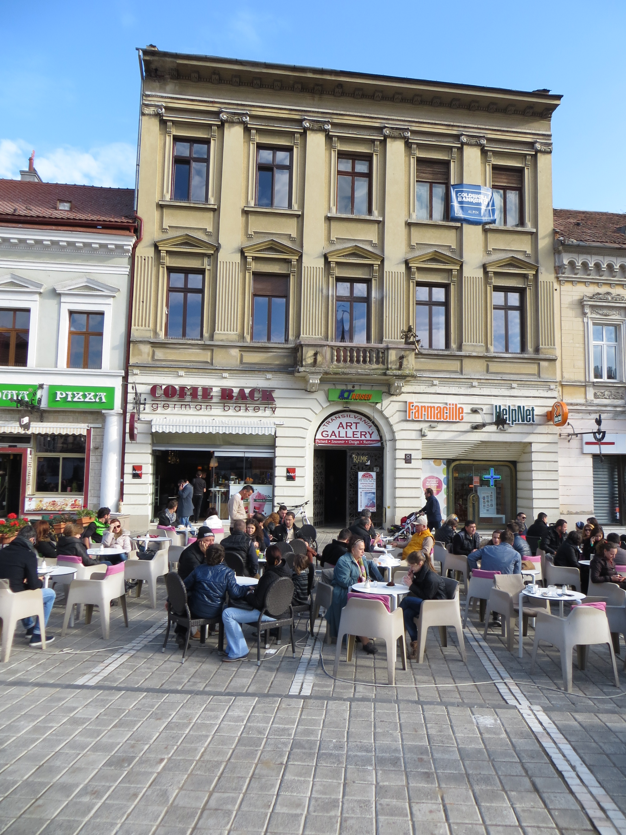 Casa Mandl